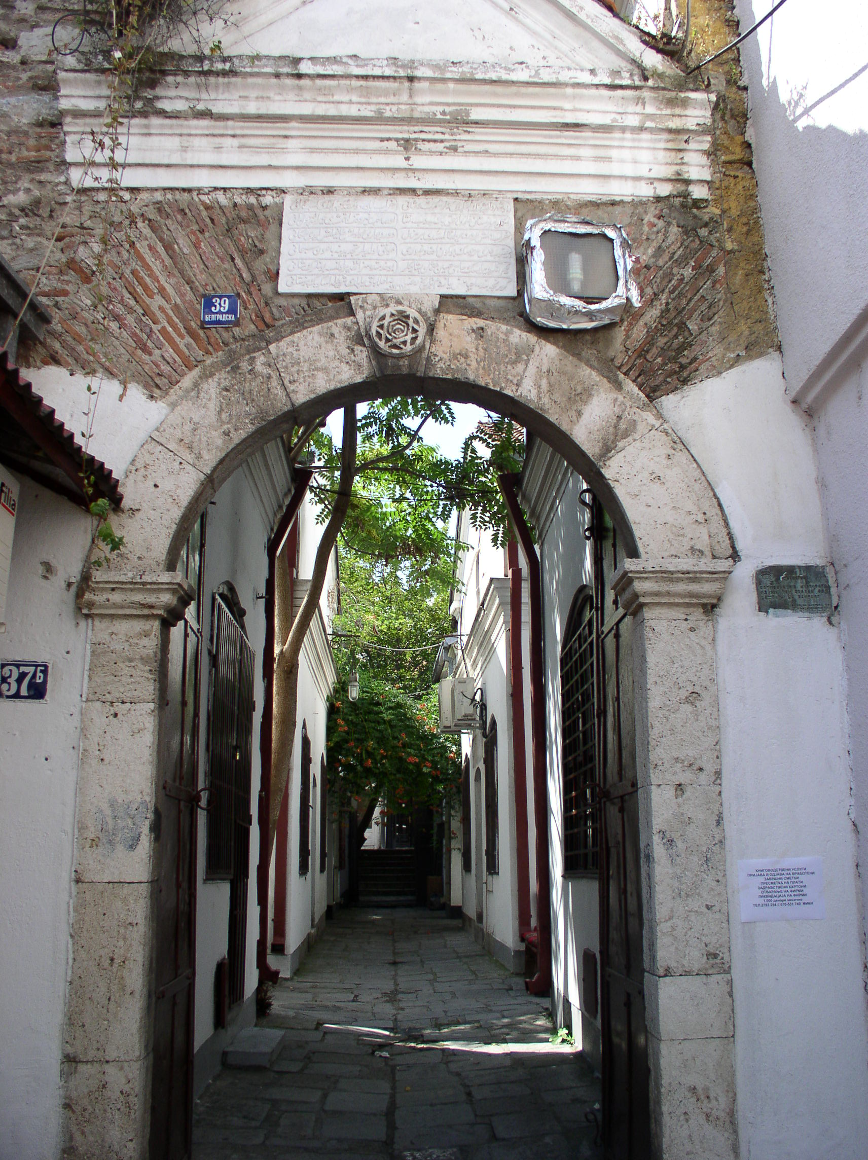 Улаз у некадашњи безистан у Скопљу